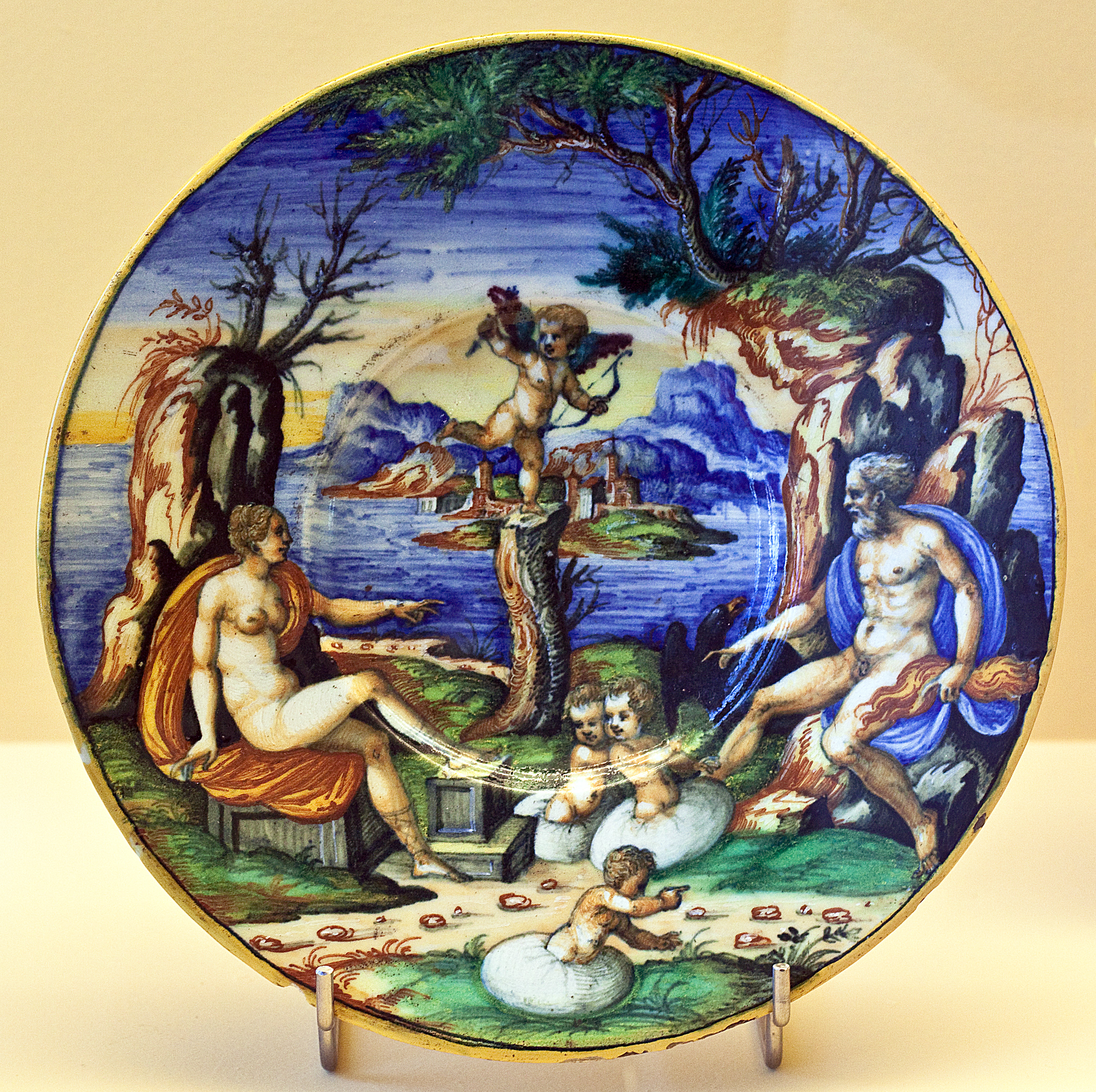 Istoriato schotels (Toegepaste kunst en Design, zaal 42) Country: Netherlands City: Rotterdam Location: Museum Boymans van Beuningen Artist: attributed to Guido Durantino and studio Name: Zeus, Hera en Amor observeren de geboorte van Helena en de Dioskuren (Castor en Pollux), 1550